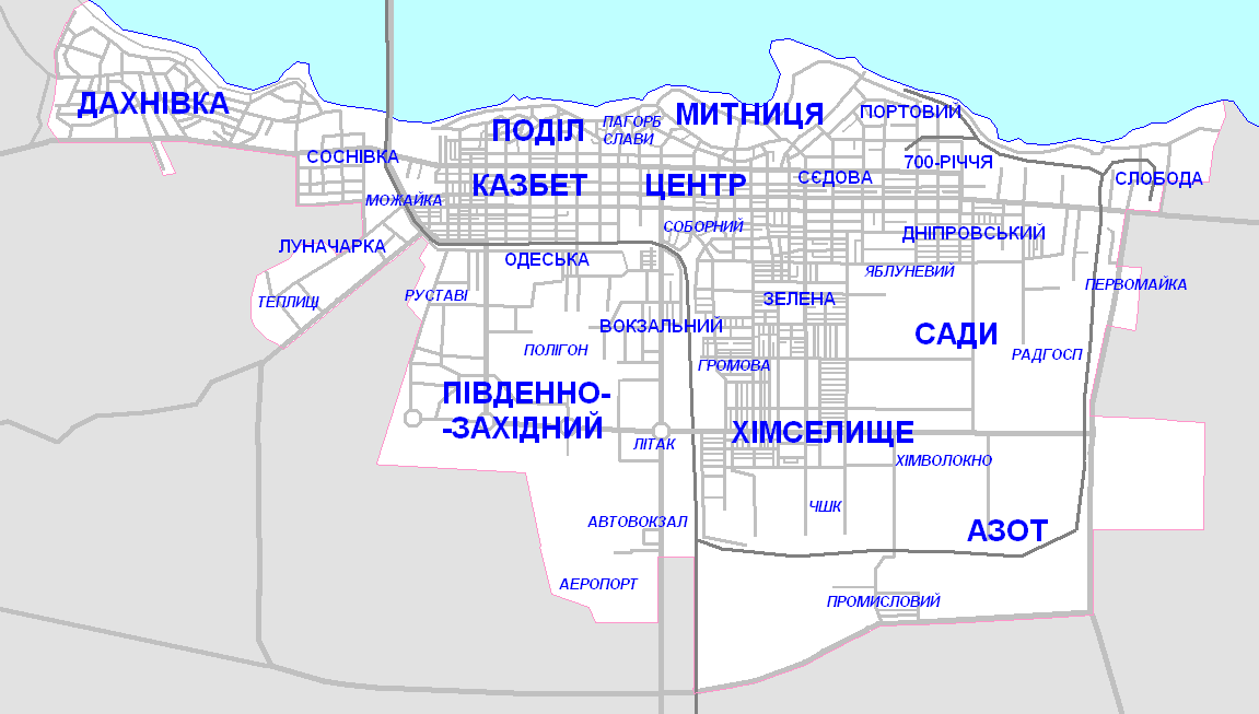 Мікрорайони Черкас: Схема розташування